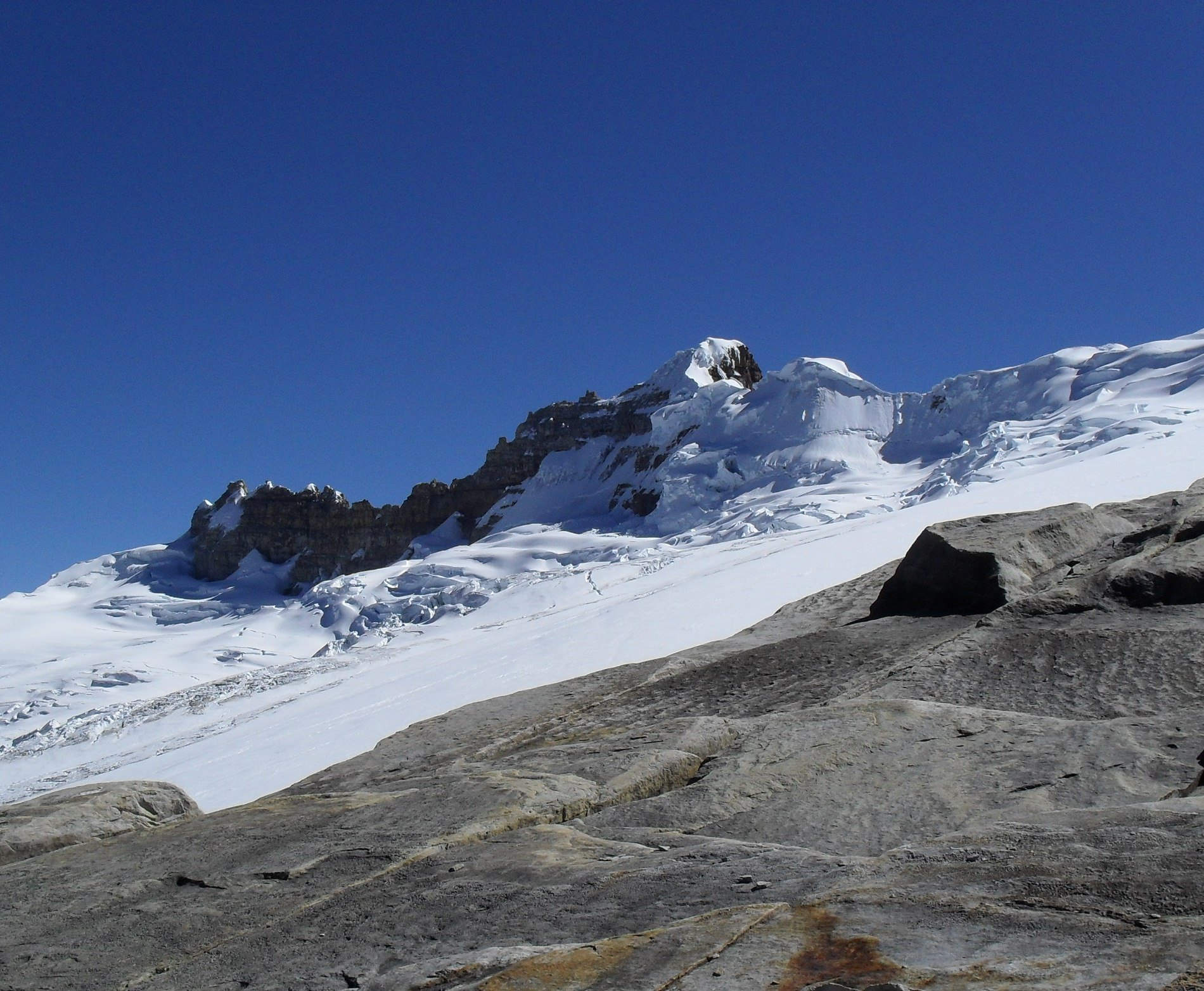 Pico Ritacuba Negro en el Parque Nacional Natural Sierra Nevada del Cocuy, Guicán, en el departamento de Boyacá Colombia